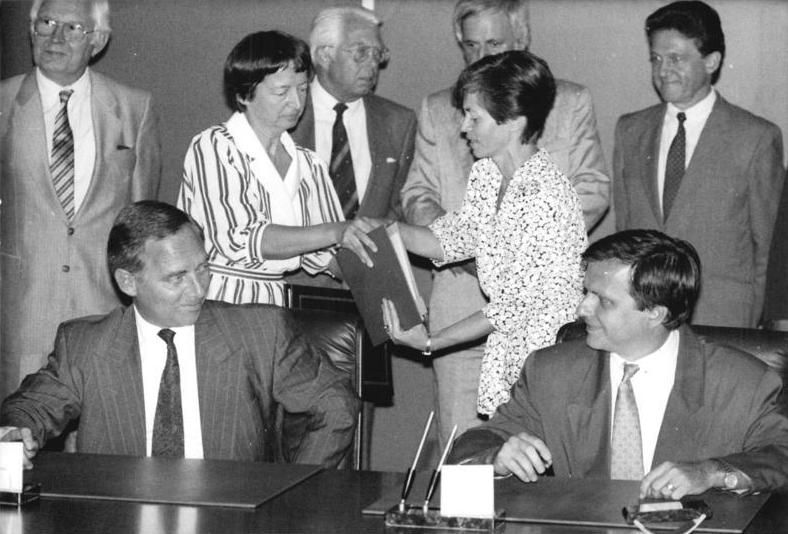 ADN-Bernd Settnik-3.8.90 Berlin: Wahlvertrag- Während die beiden Exemplare des deutsch-deutschen Wahlvertrages für die zweite Unterschrift ausgetauscht werden (Hintergrund), überbrücken die Unterhändler, DDR-Staatssekretär Günther Krause (r.) und BRD-Innenminister Wolfgang Schäuble, die kleine Wartepause mit einem lockeren Gespräch.